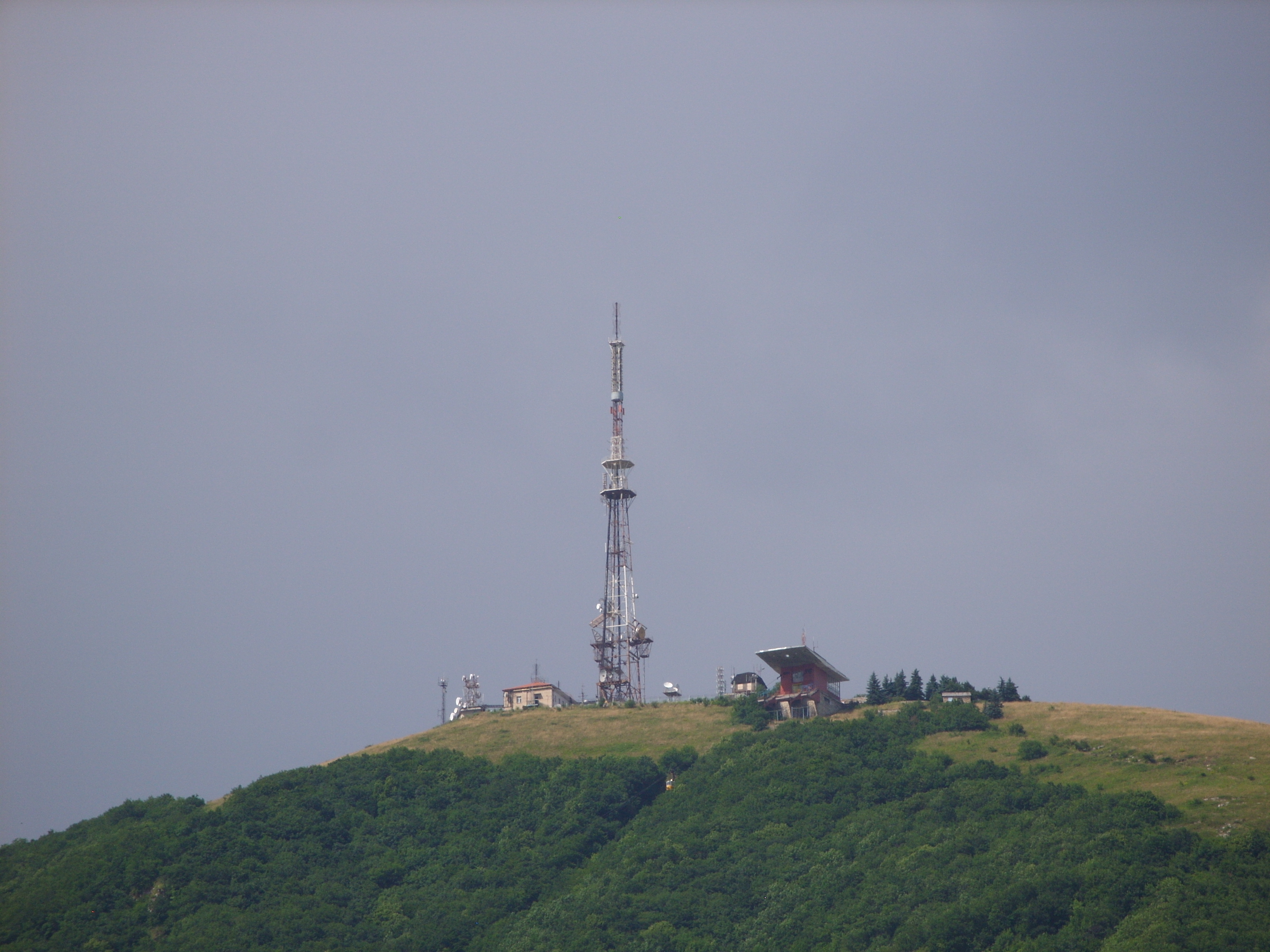 снимок июля 2009 г.